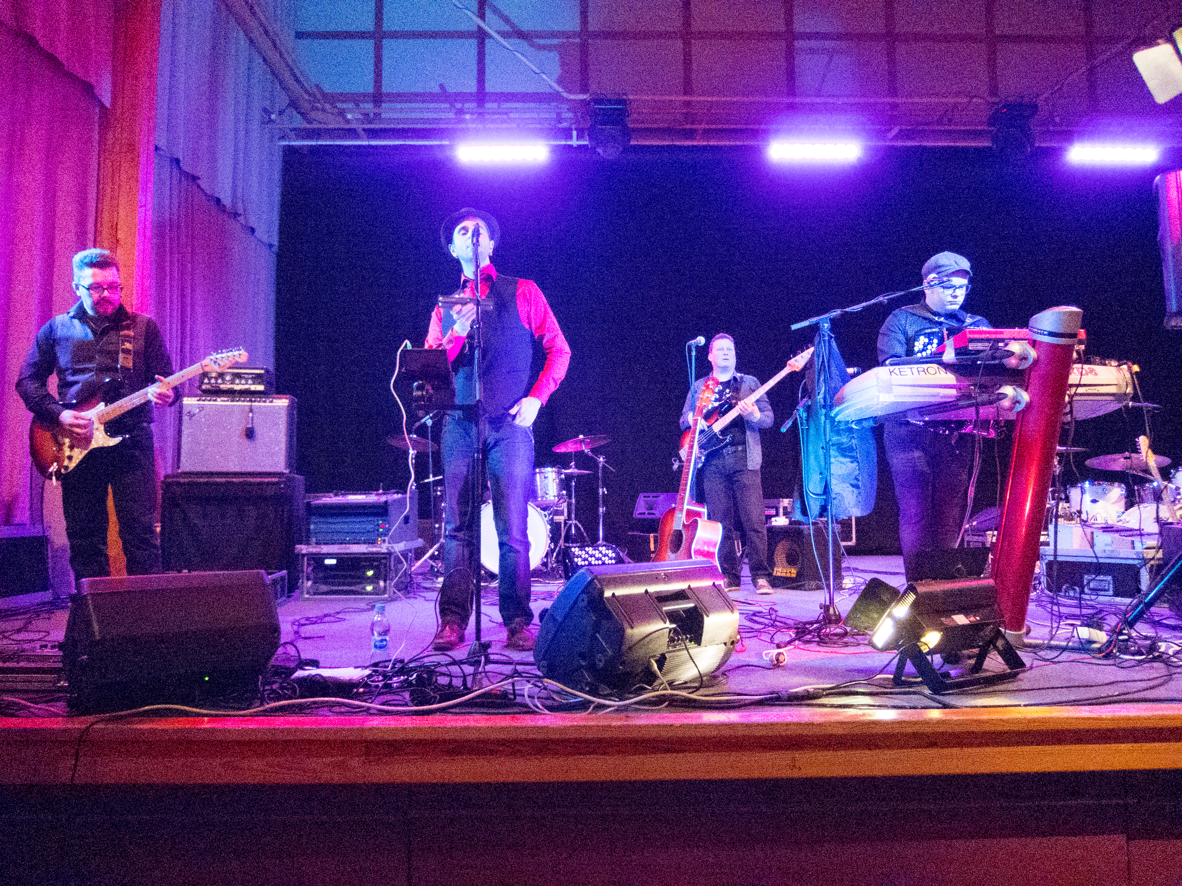 Unelmavävyt suomalainen tanssiorkesteri